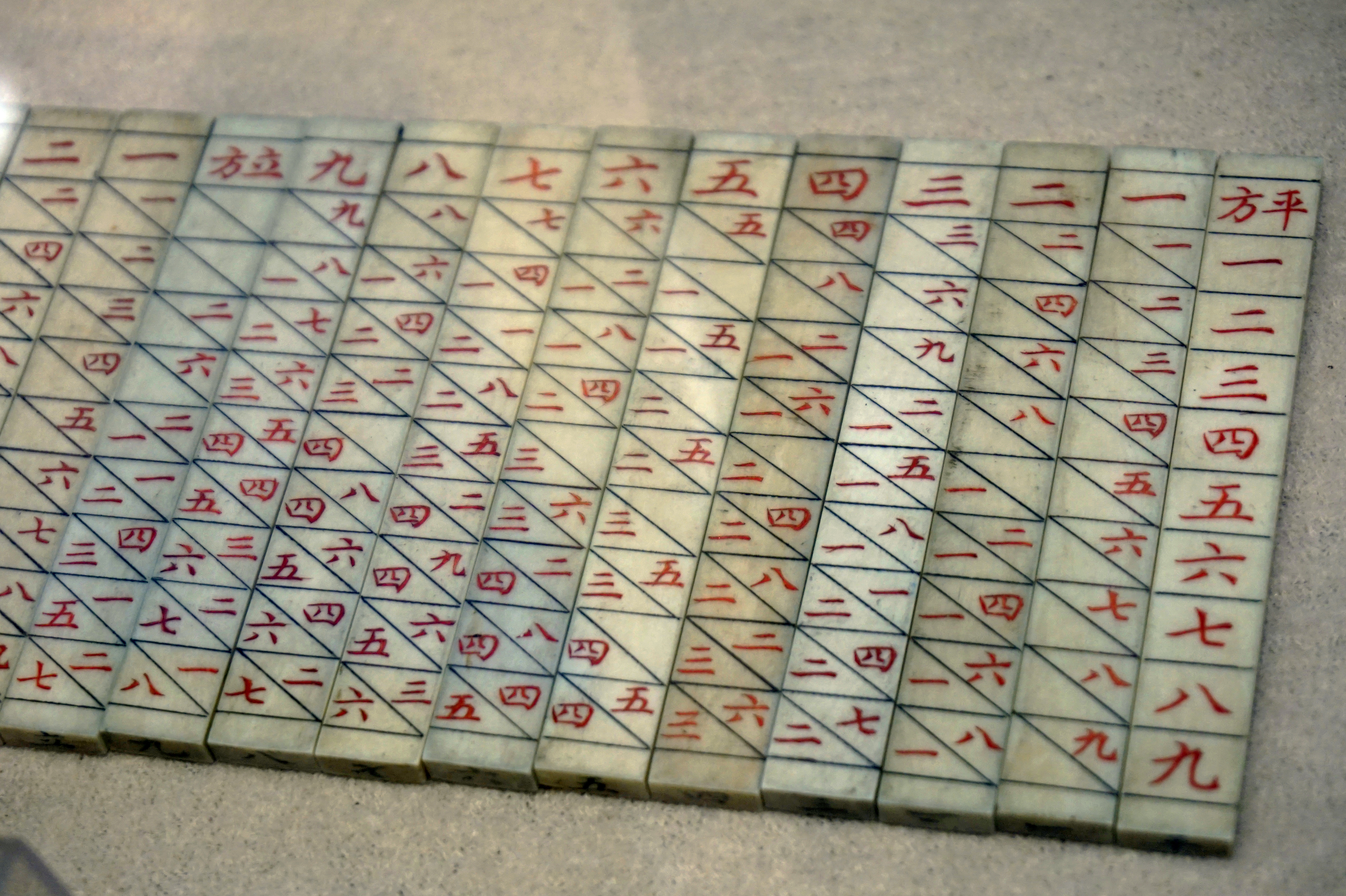 清骨质算筹一组。中国财税博物馆藏。